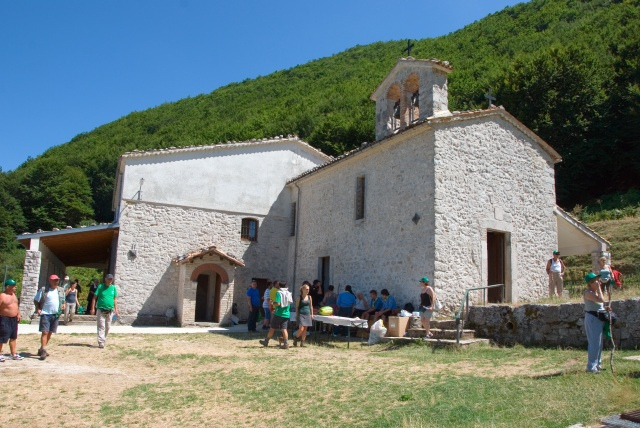 Wikipedia: Bojano.